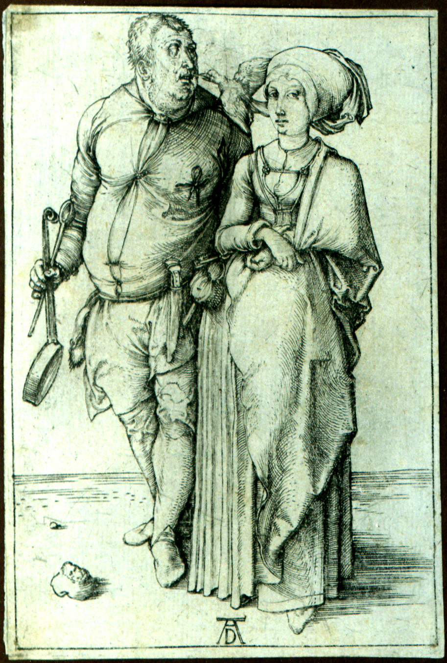 Dürer, Albrecht (1471-1528): The Cook and his Wife. Der Koch und sein Weib. Kupferstich/engraving. 11,4 x 8,1 cm. Um 1497. B. 84, Meder 85 c (von e). Mit den Kritzeln am Boden, über der Brust der Frau und der Elster. Ausgezeichneter Druck mit der Spur eines Rändchens an drei Seiten, rechts mit Rändchen um die Einfassungslinie. Kleine Ausbesserungen an der linken oberen und unteren Ecke, sonst sehr gut erhalten. Aus der Sammlung Holtkott (nicht bei Lugt). — Note what appears to be a breast pocket on the shirt of the cook. If it is, this is the earliest documented illustration of a pocket (breast or otherwise) that I have come across.